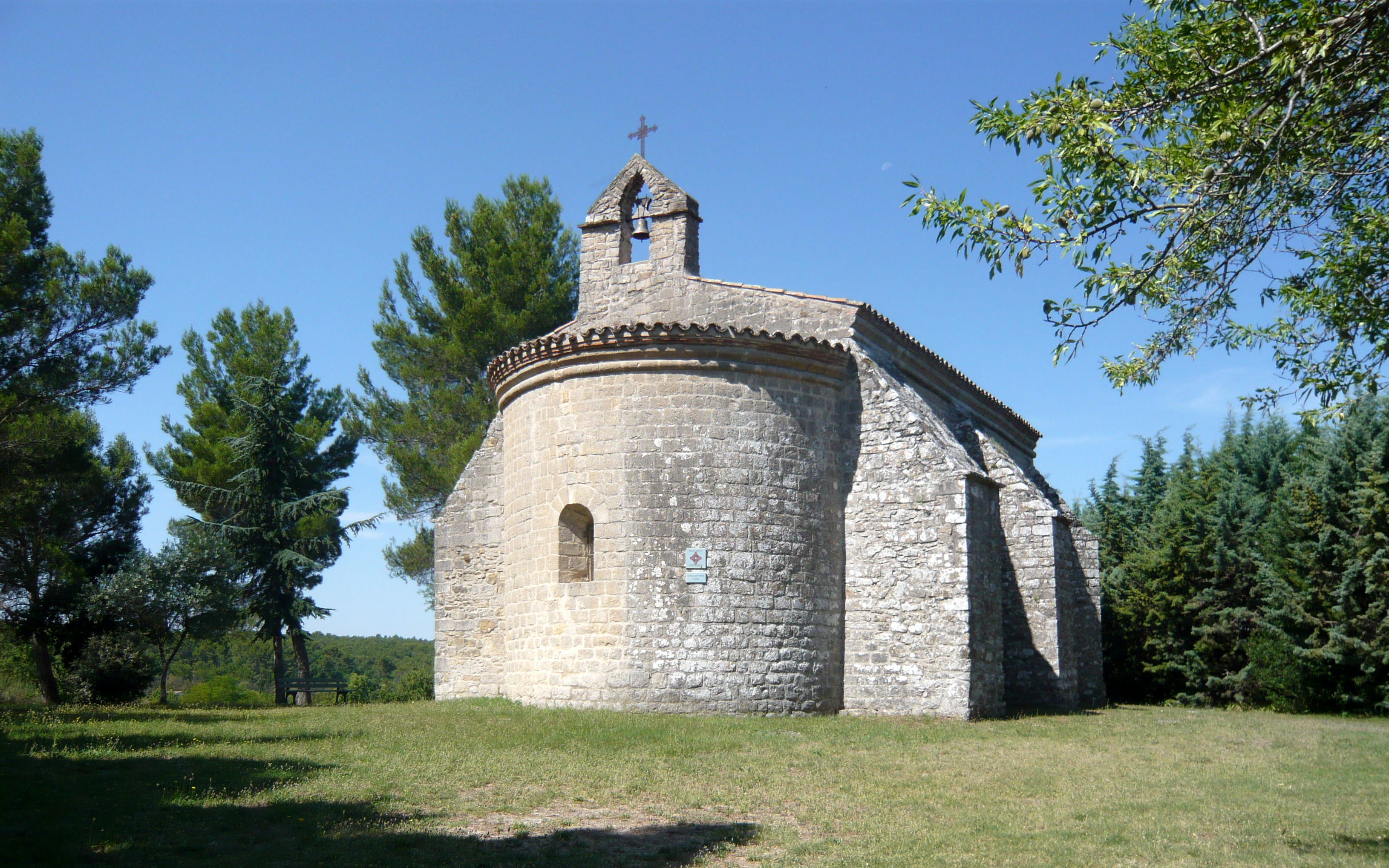 Chapelle Saint-Pierre, Peynier, Bouches-du-Rhône (France).